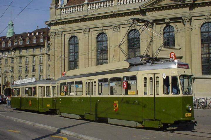 Standard-Tramzug bestehend aus dem Triebwagen Be 4/4 630 ex 130 und dem Anhänger 330 beim Umfahren der Heiliggeistkirche in Bern.